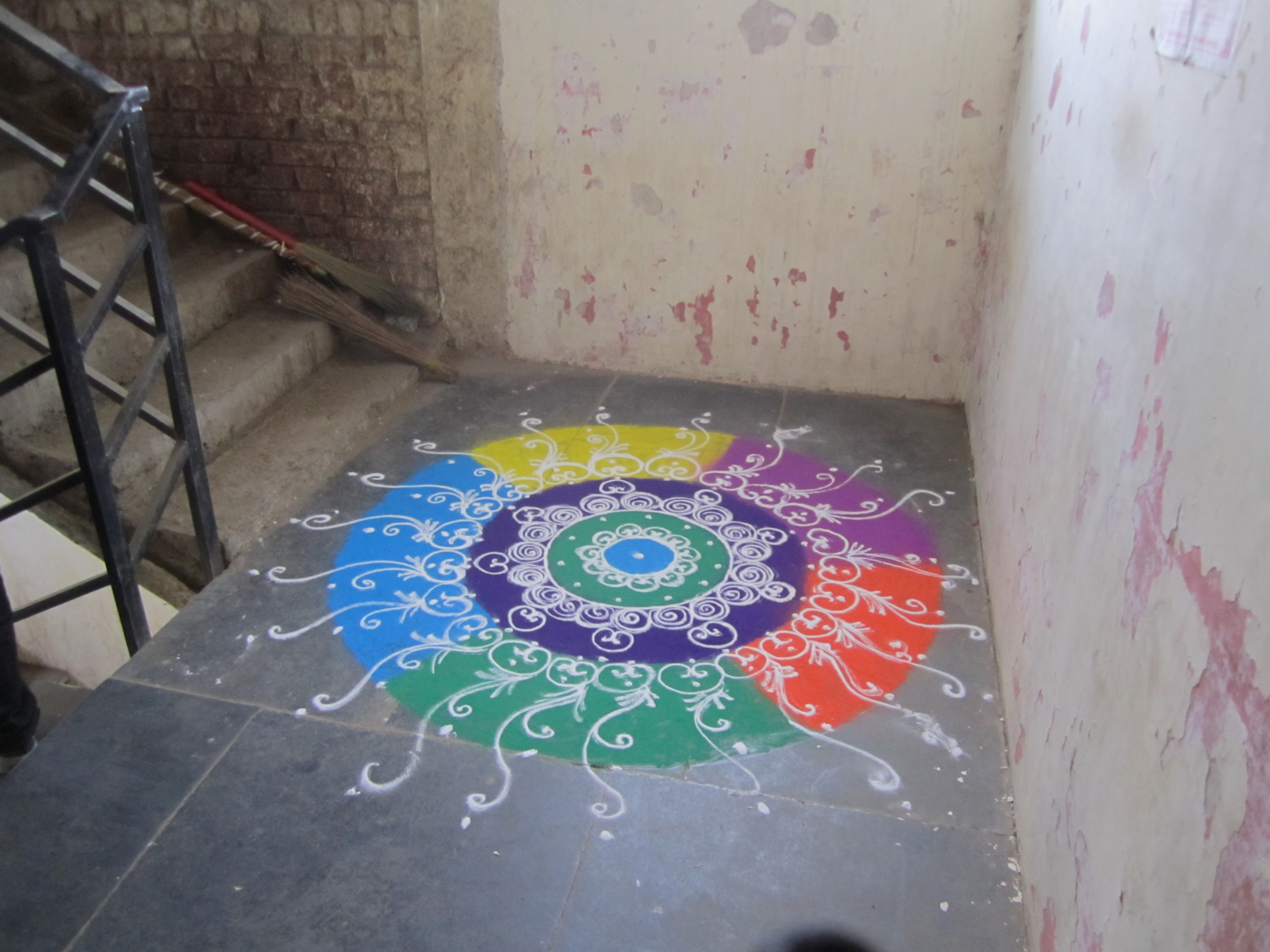 Dipavali Rangoli at Maharashatr Bank Ambad, Nashik, India